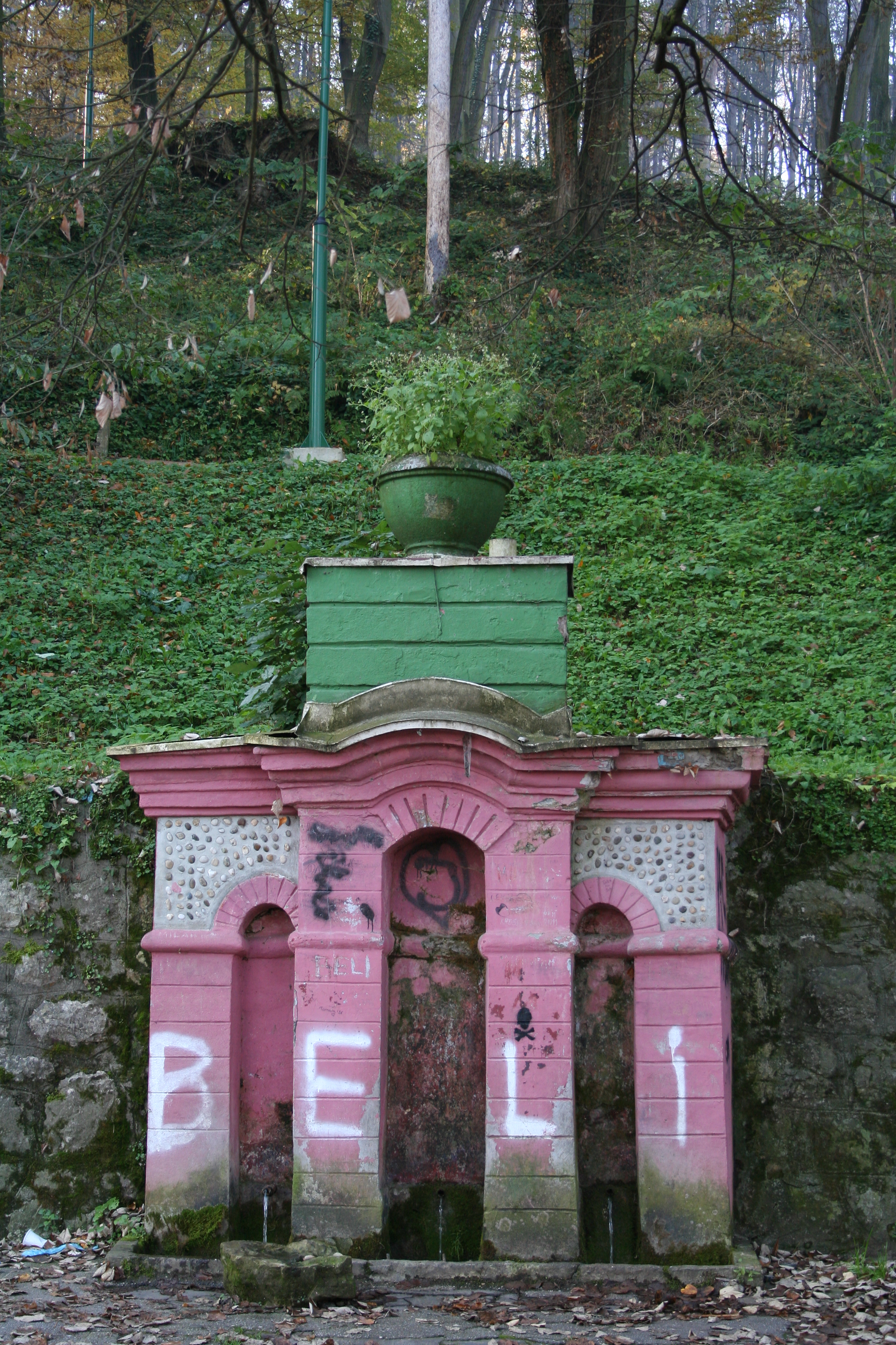 Banja Koviljača